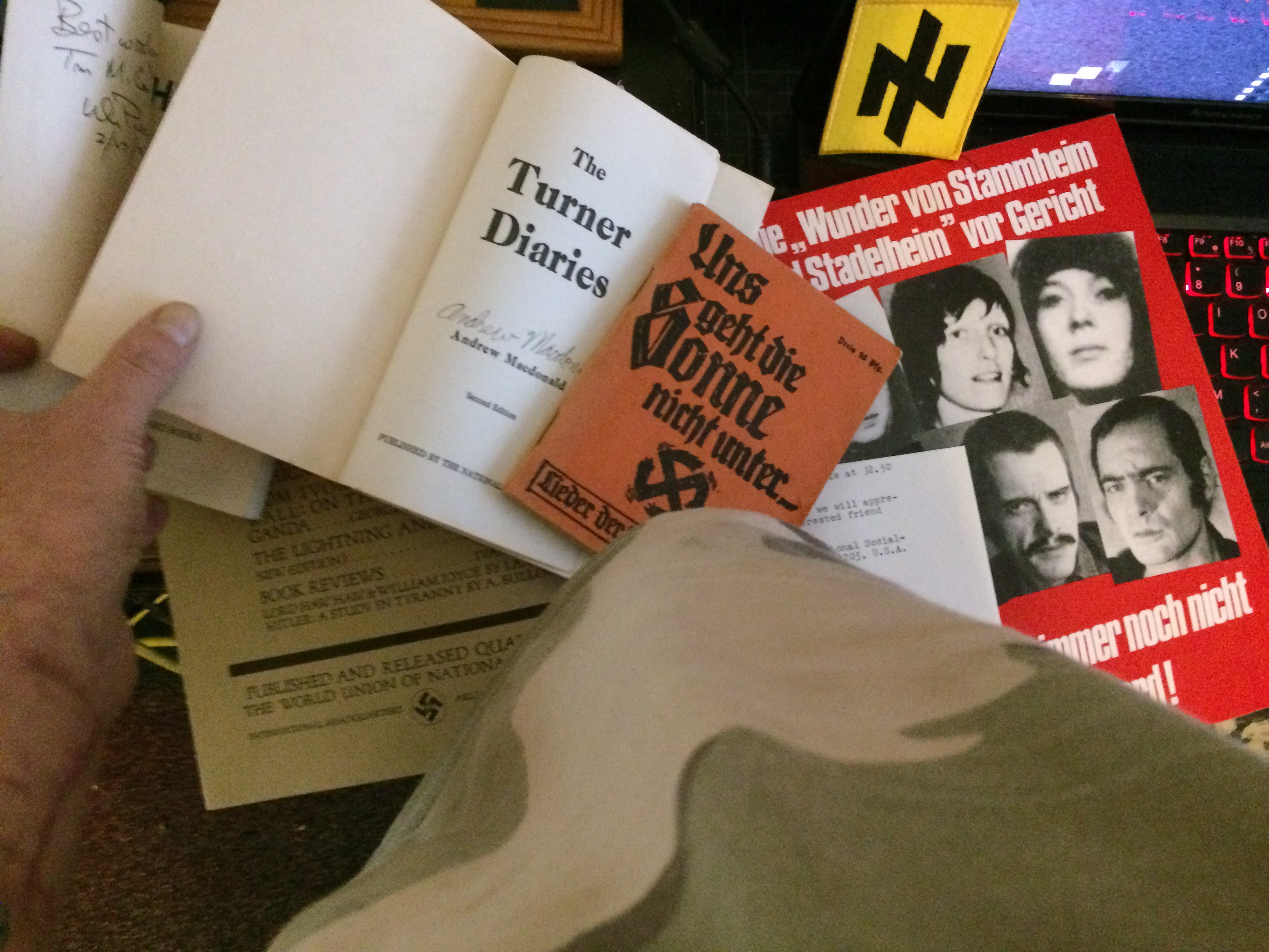 inherited ideogy